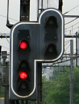 Signal SNCF appelé « carré » : il commande l'arrêt absolu